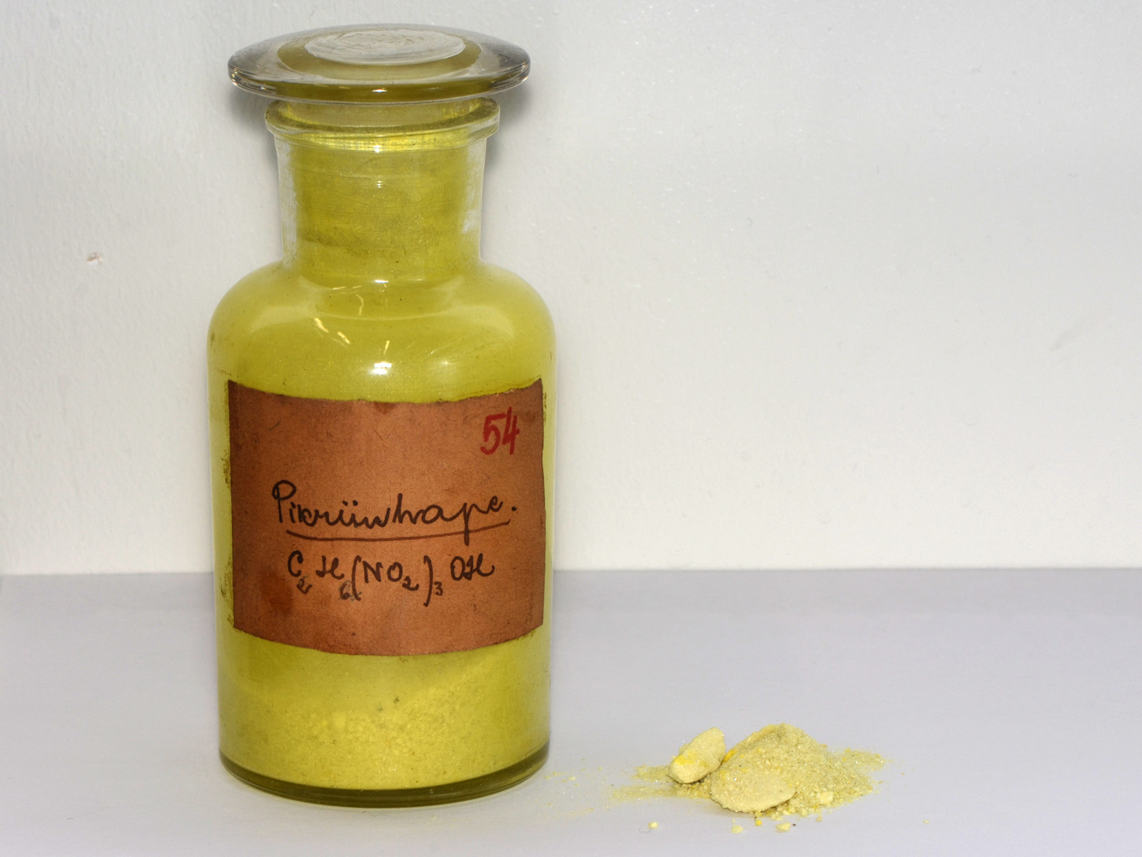 Pikriinhape